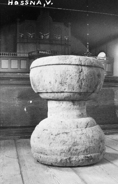 Dopfunt, sandsten, två cuppor som sammanfogats, 1200-talet. Snabbinv. Kategori: (04) DopfuntarDopfunt, sandsten, två cuppor som sammanfogats, 1200-talet. Snabbinv.